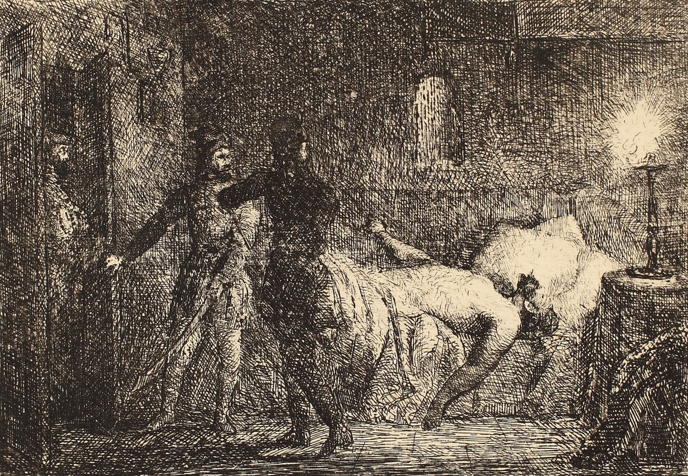 Moartea Lăpușneanului - Gravură, acvaforte şi gravură cu acul, 10 × 13 cm - Opera este catalogată în "Repertoriul graficei românești din secolul al XIX-lea", vol.I, A-R, București, 1974, la pag. 4, cat. 169.